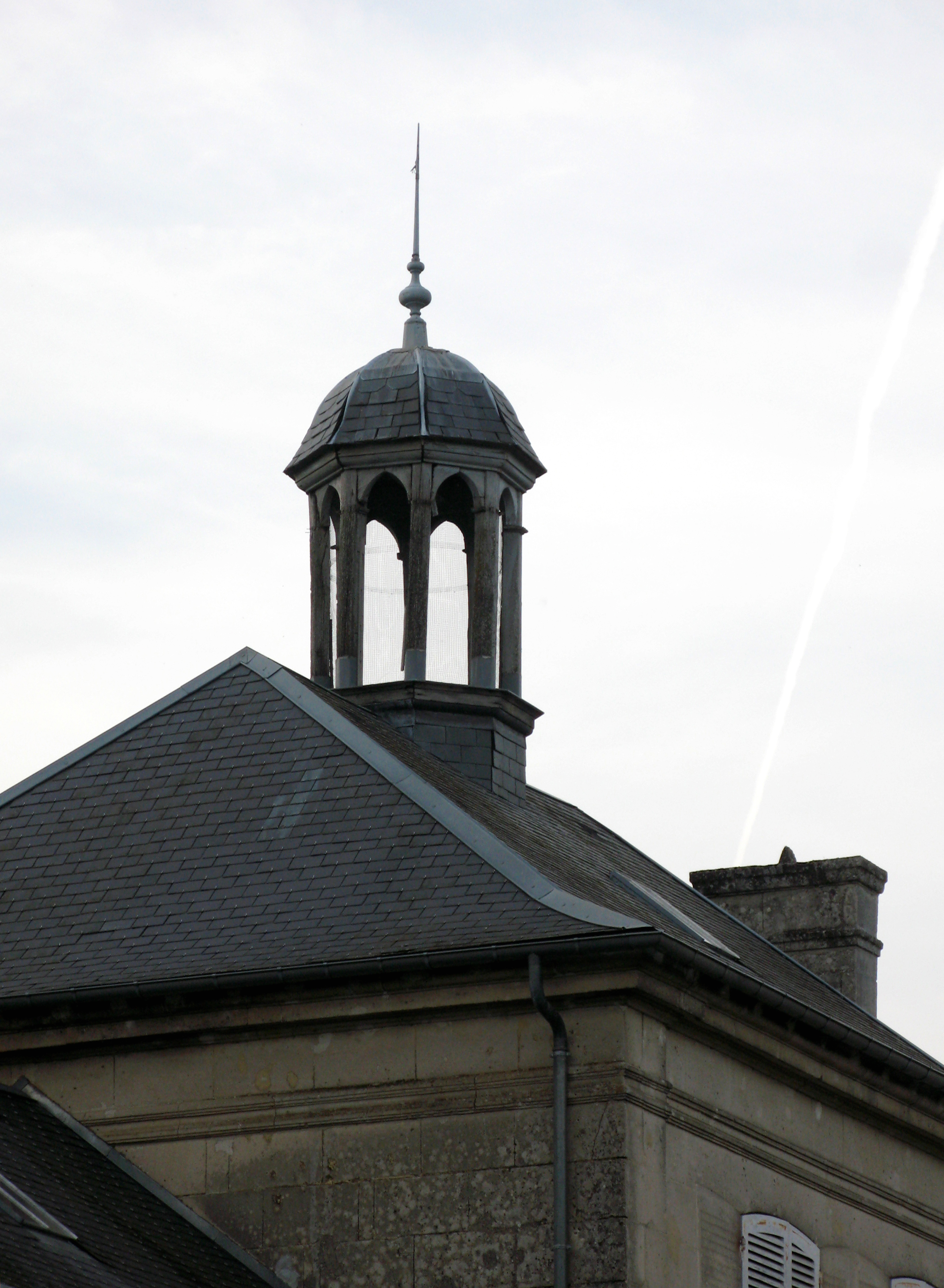 Laversine (Aisne, France) - Le clocheton du toit de la mairie. . .